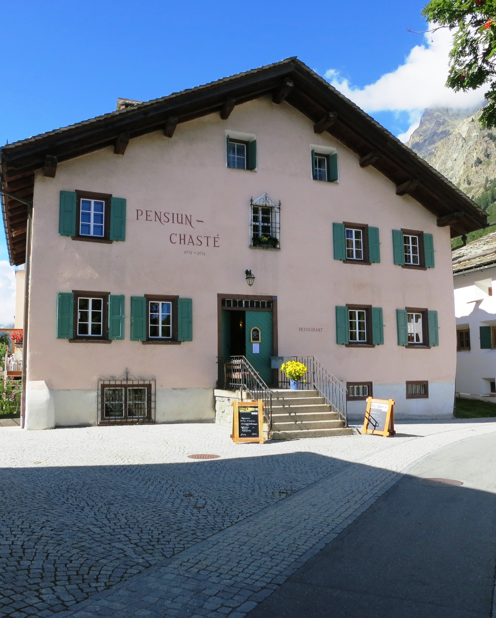 Pensiun Chasté, Sils-Baselgia GR, Schweiz